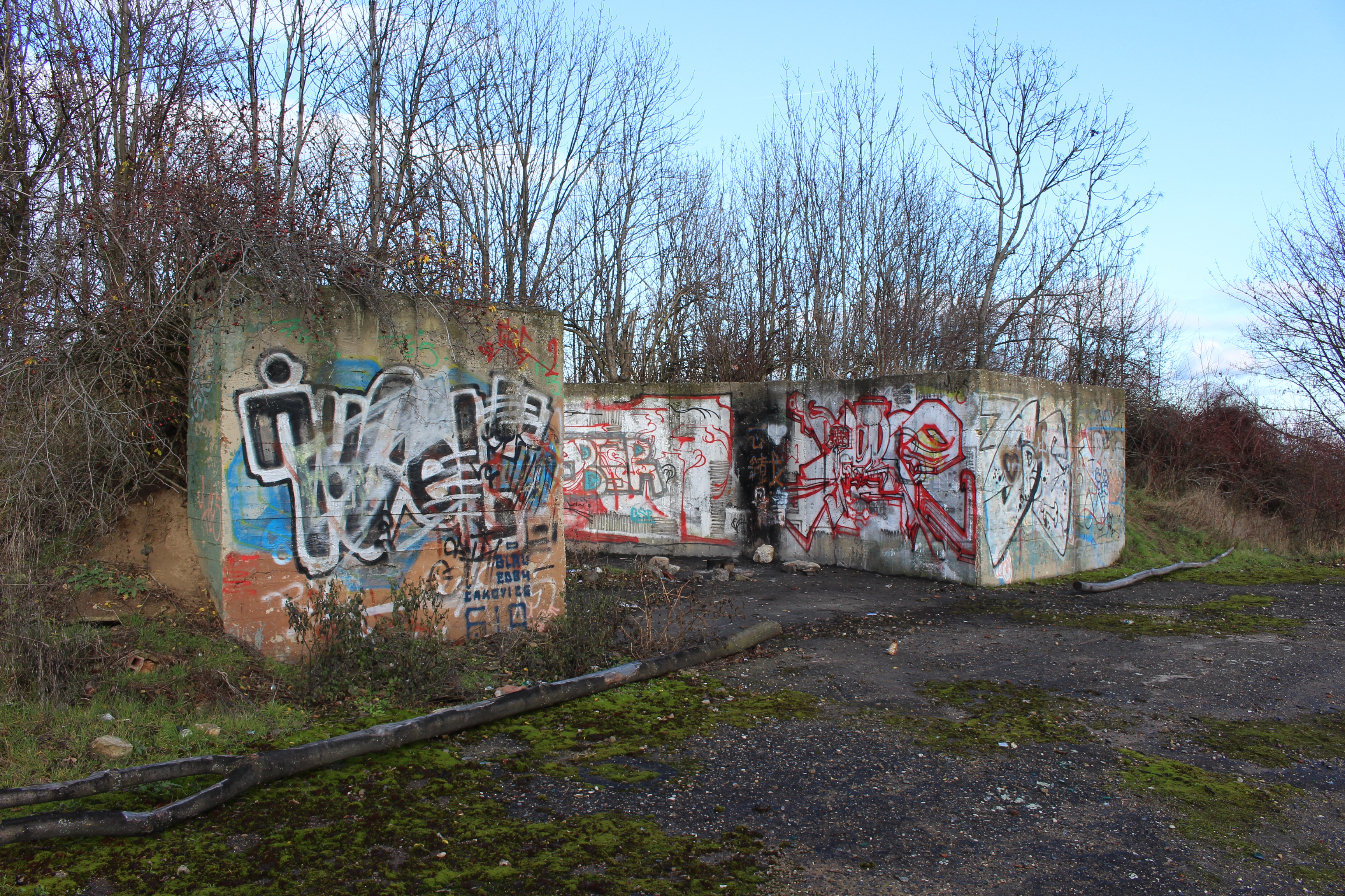 Zabitý kopec